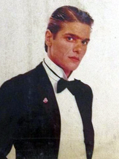 Retrato del cantautor uruguayo Gervasio Viera, publicado en la carátula de su disco Gervasio de 1983 (RCA Victor).